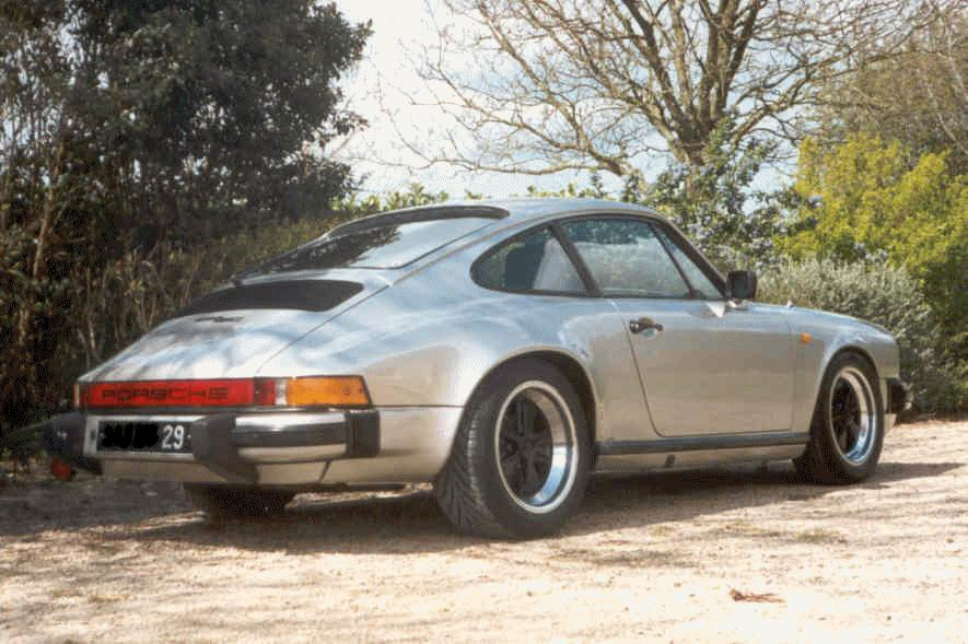 Porsche 911 SC (1983), ur wetur a Vro-Leon.